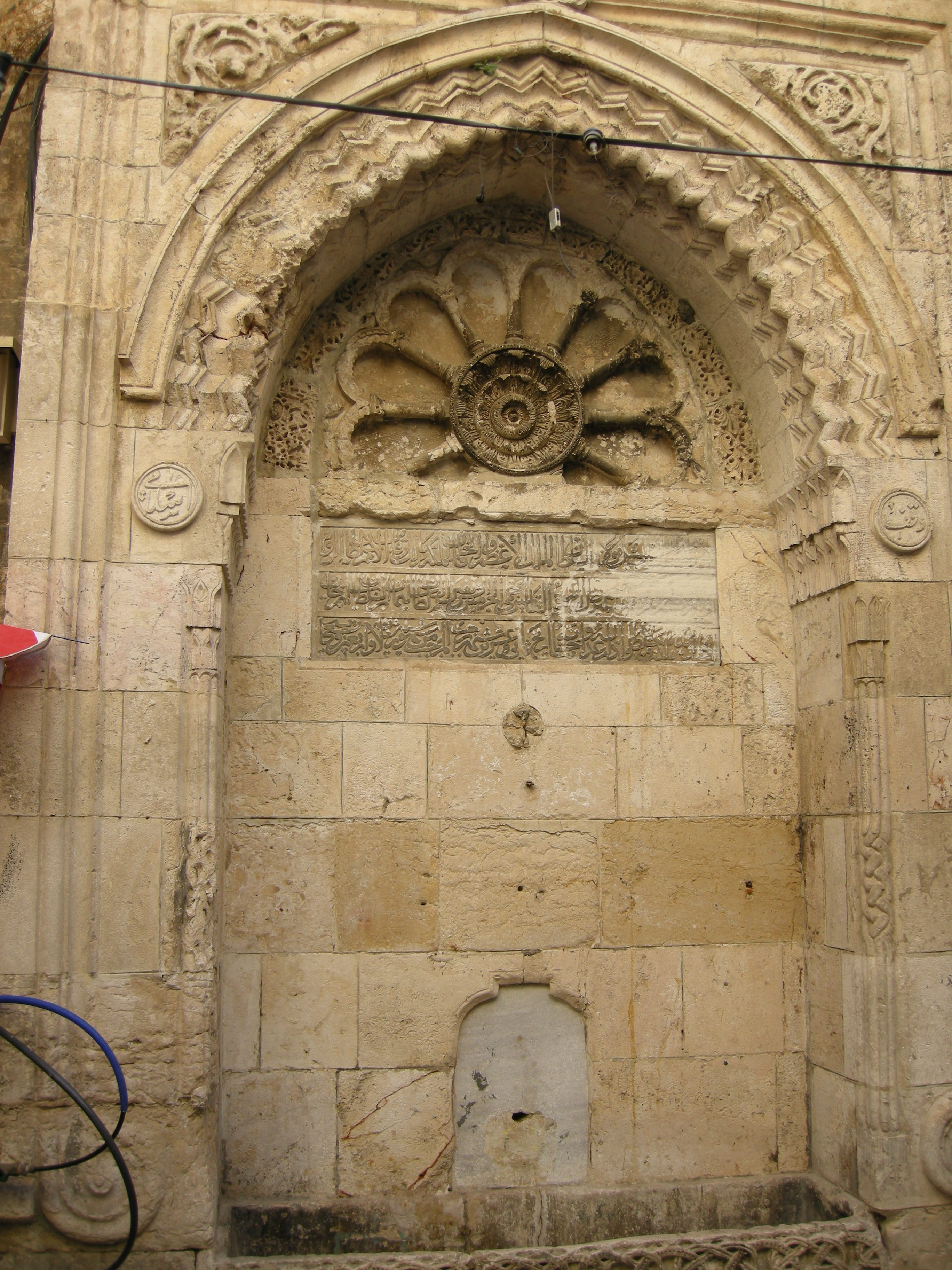 Mamluk impact on Jerusalem